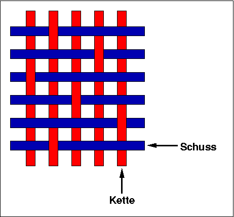 Prinzip der Atlasbindung